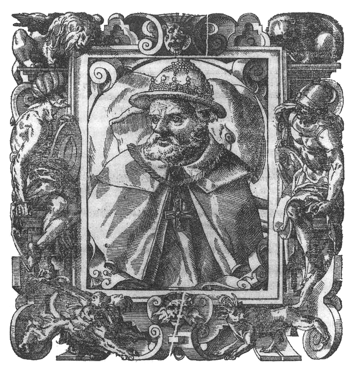 Tristao da Cunha (engraving)